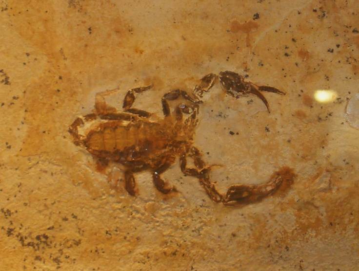 Fossil of Araripescorpius, an extinct arachnid- Took the photo at Fossil Show, Munchen 2011